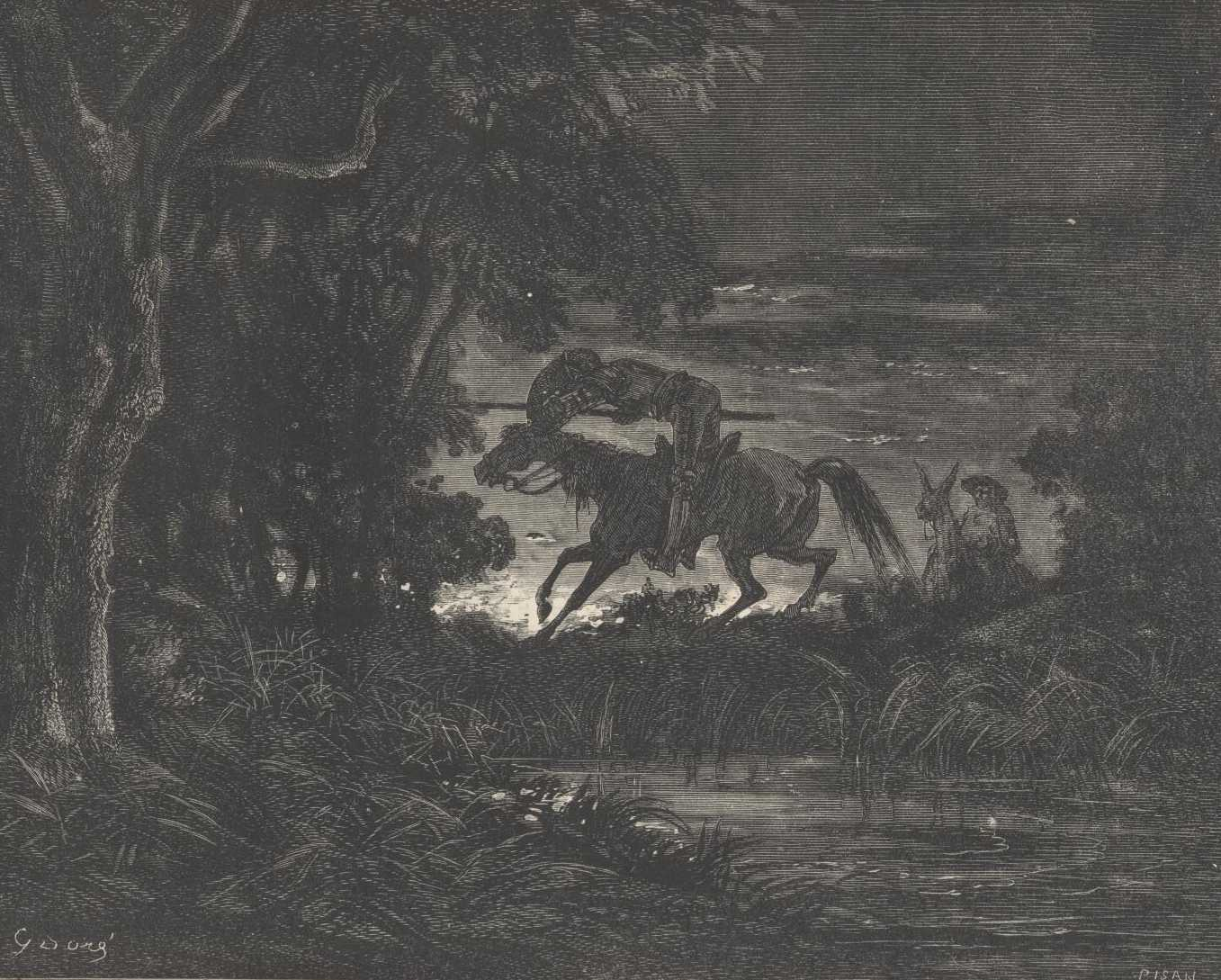 Dom Quixote ataca no escuro